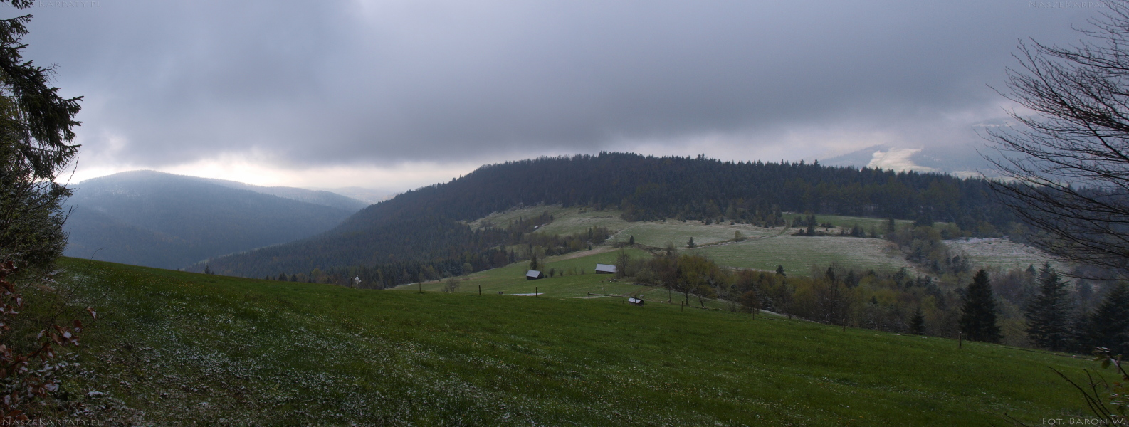 Położona na wysokości ok. 770 m n.p.m. przełęcz w Beskidzie Wyspowym pomiędzy Miznówką (969 m) a Myszycą (877 m). Obydwa te szczyty i Przełęcz Przysłopek znajdują się na grzbiecie łączącym Jasień z Gorcami poprzez przełęcz Przysłop Lubomierski. Wschodnie zbocza spod Przysłopka opadają do głębokiej i zalesionej kotliny Kamienicy Gorczańskiej, zbocza zachodnie do doliny Mszanki.